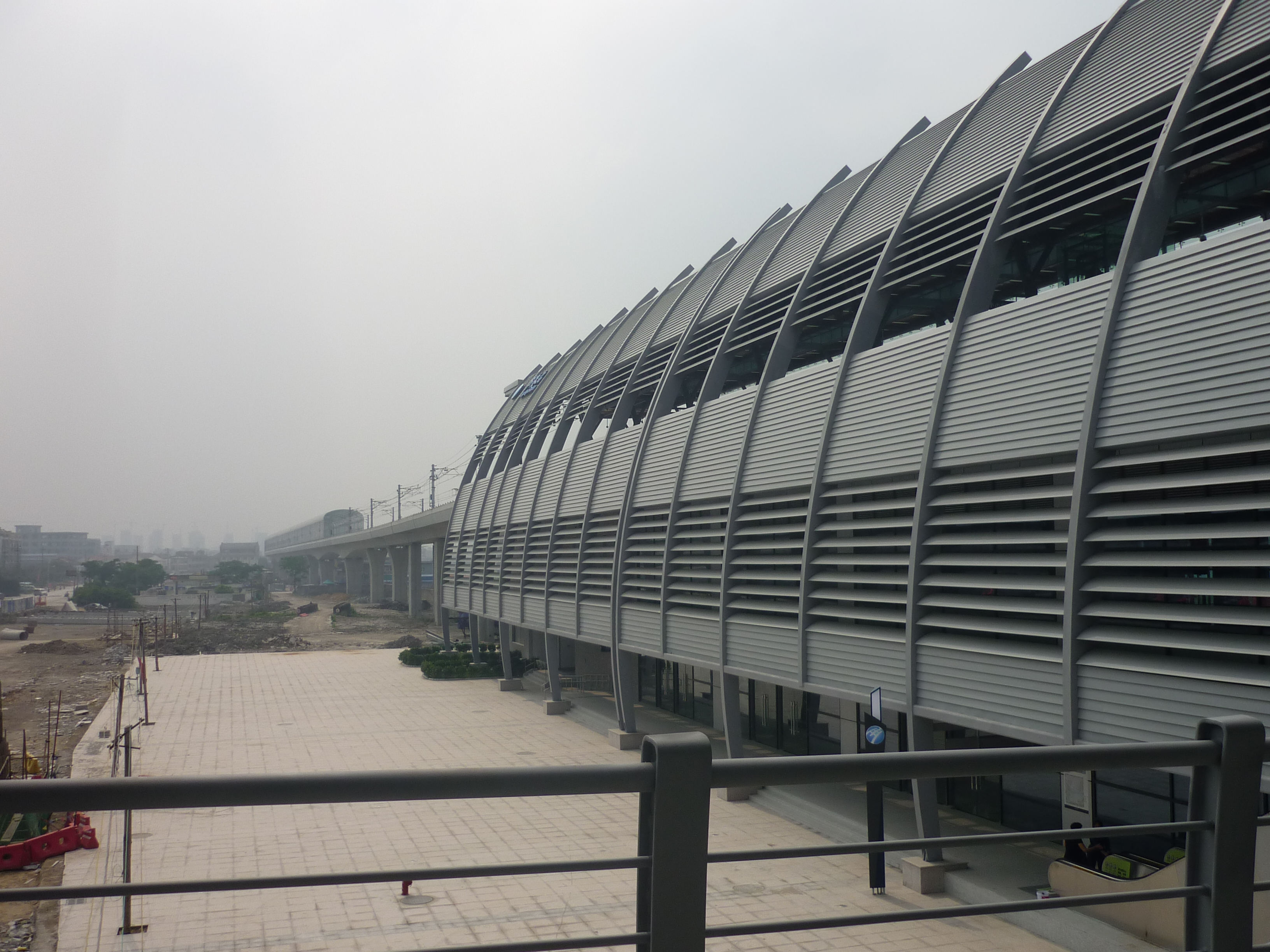 宁波地铁芦港站